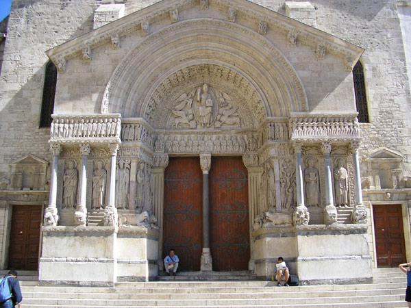 Arles, Église Saint Trophime.